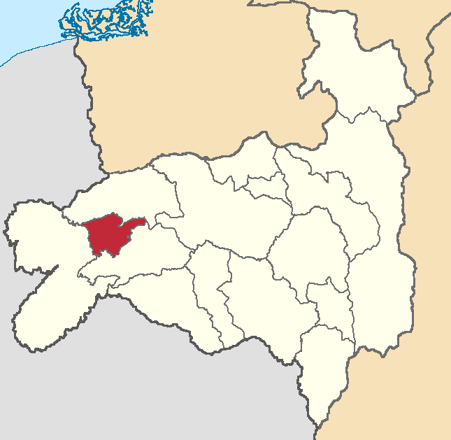 Mapa localizador del cantón en Loja, Ecuador